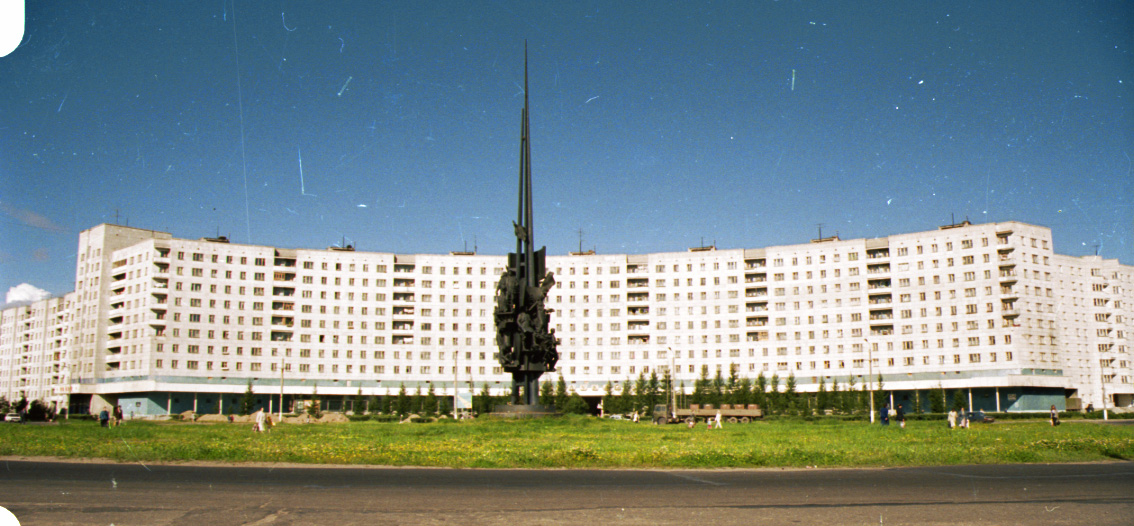 for severodvinsk